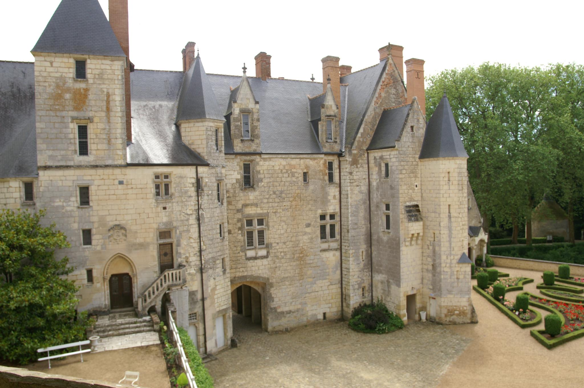 Château de Courtanvaux, Bessé-sur-Braye, Sarthe, France